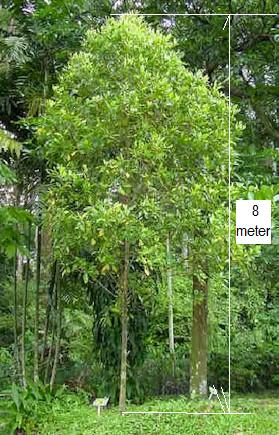 Pokok cengkih boleh dituai cengkih bila setinggi 8 meter lebih.